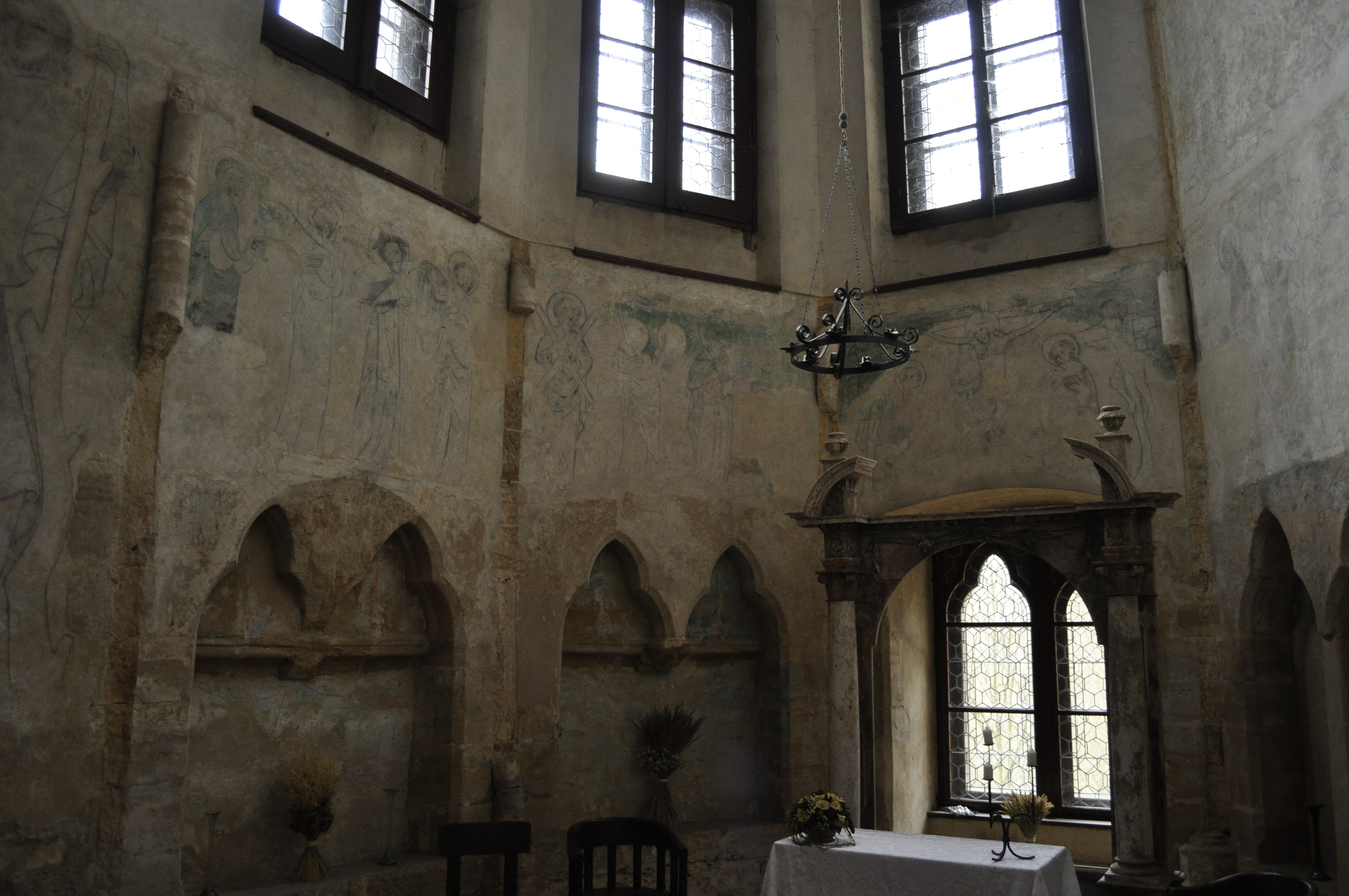 interier kaple hradu Houska